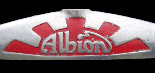 sufi plstic